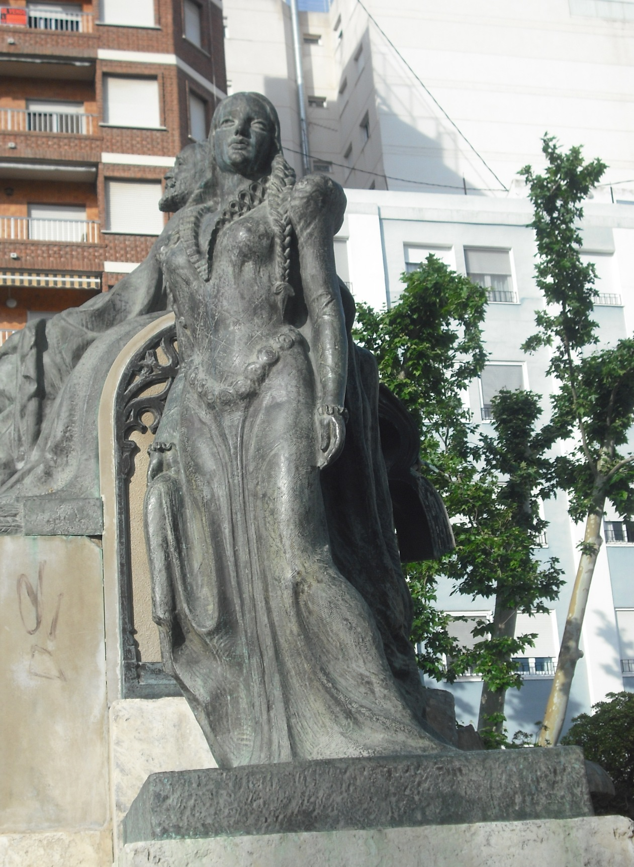 Grupo escultórico inspirado en la zarzuela "La Bruja", parte del Monumento a Ruperto Chapí de Villena.